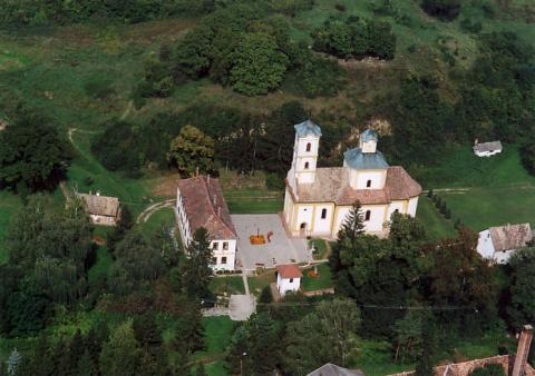 Grábóc, Hungary, aerialphotography